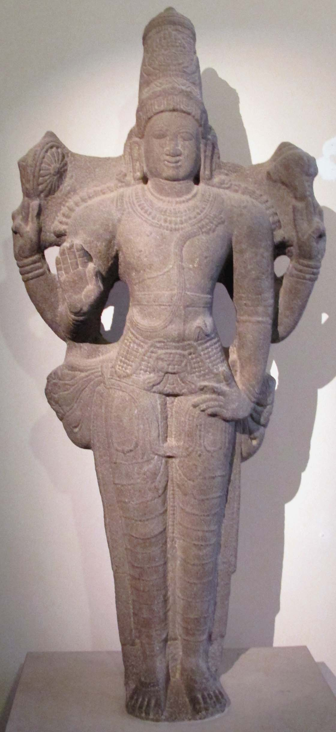 Tamil nadu, vishnu (incompiuto), XII-XIII sec